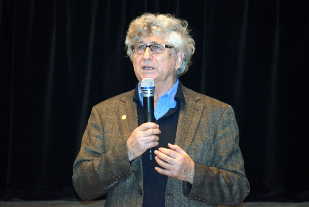 02014 Feliks Falk ein polnischer Filmregisseur, Theater- und Drehbuchautor.